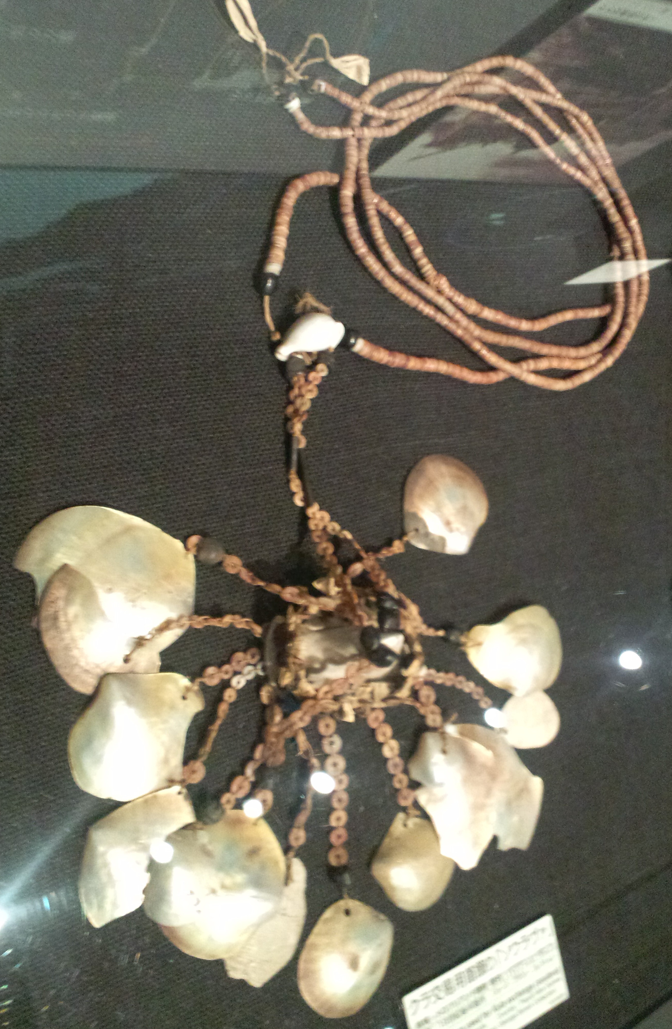 国立民族学博物館（大阪） クラ交易用首飾り「ソウラヴァ」（パプアニューギニア、トロブリアンド諸島、19世紀後半製作、ジョージ・ブラウン・コレクション）